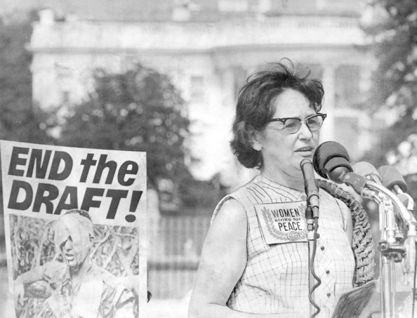 1961eko azaroaren 1eko mugimendua